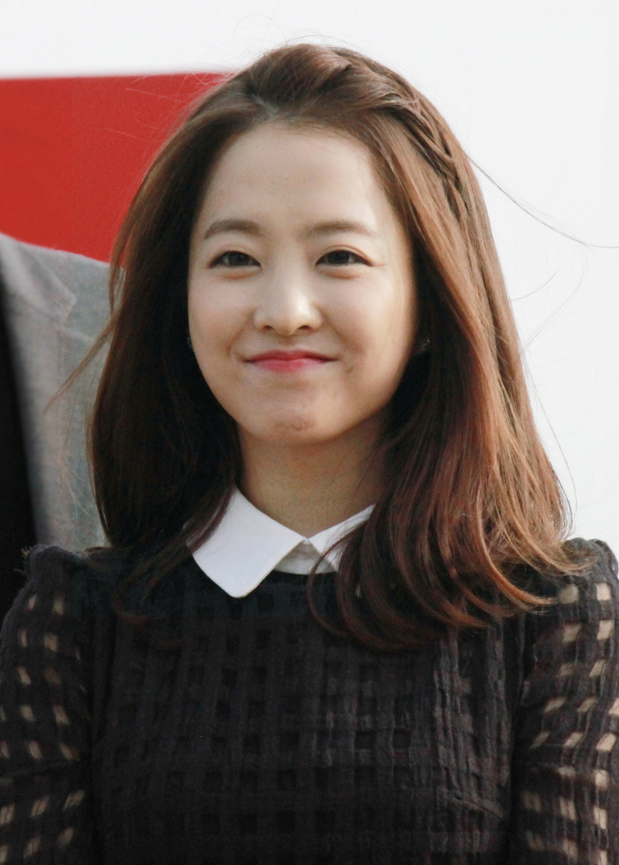 151003 부산국제영화제 돌연변이 야외 무대인사 (Park Bo-young)